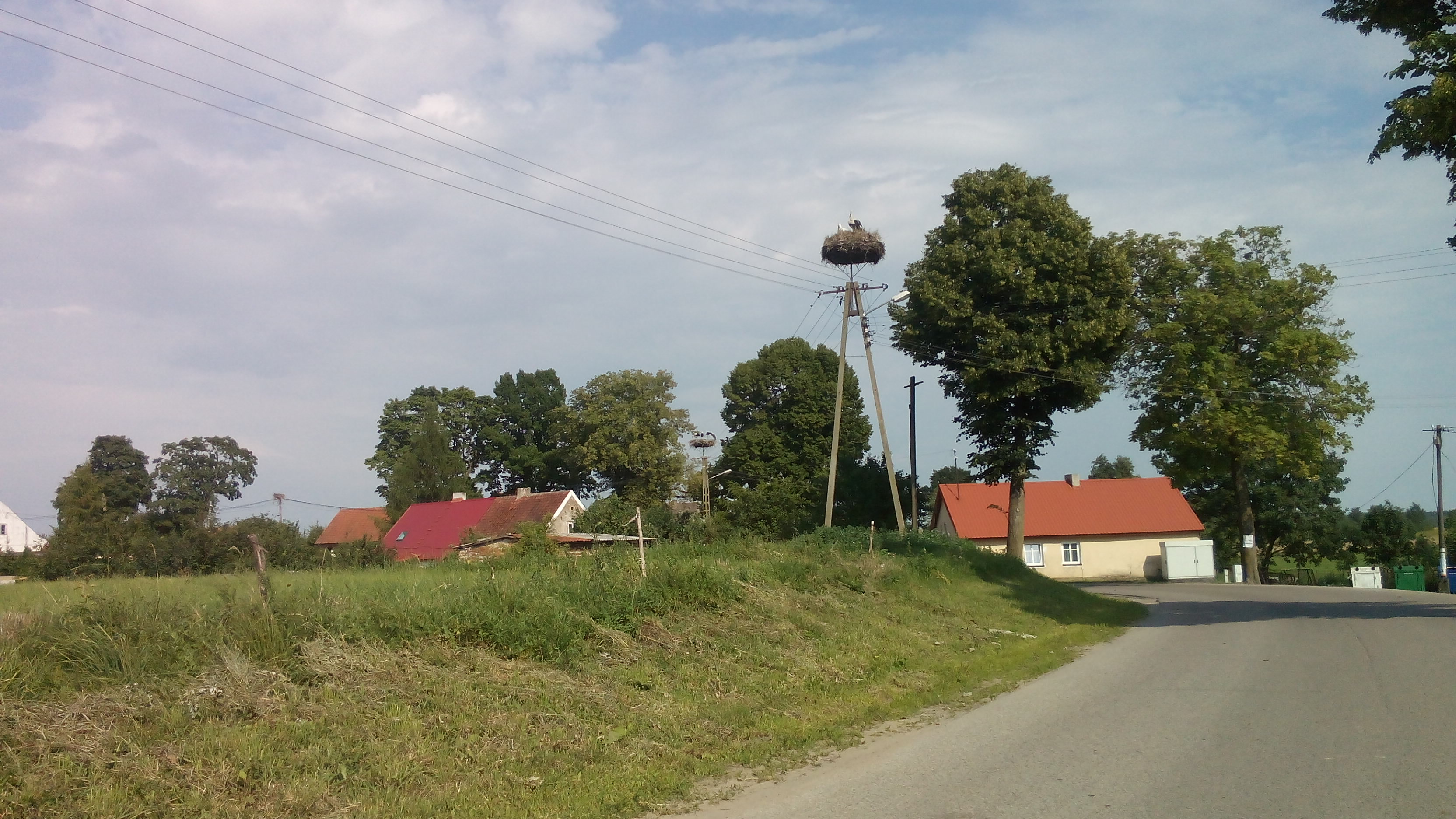 Gniazdo bociana białego znajdujące się we wsi Czyprki